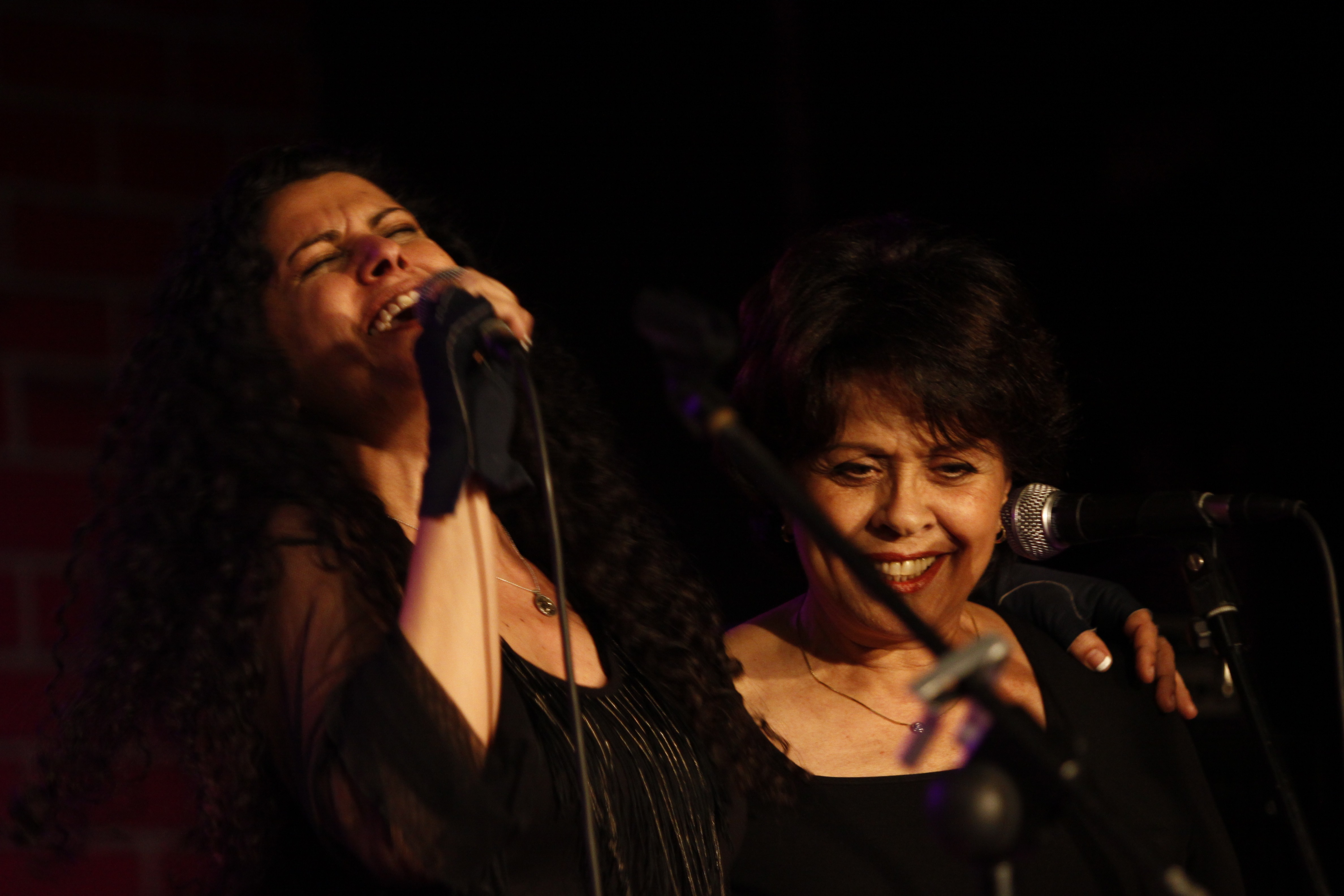 פזית נוני בהופעה בסאבליים - עם גאולה נוני 21.1.11 השקת האלבום